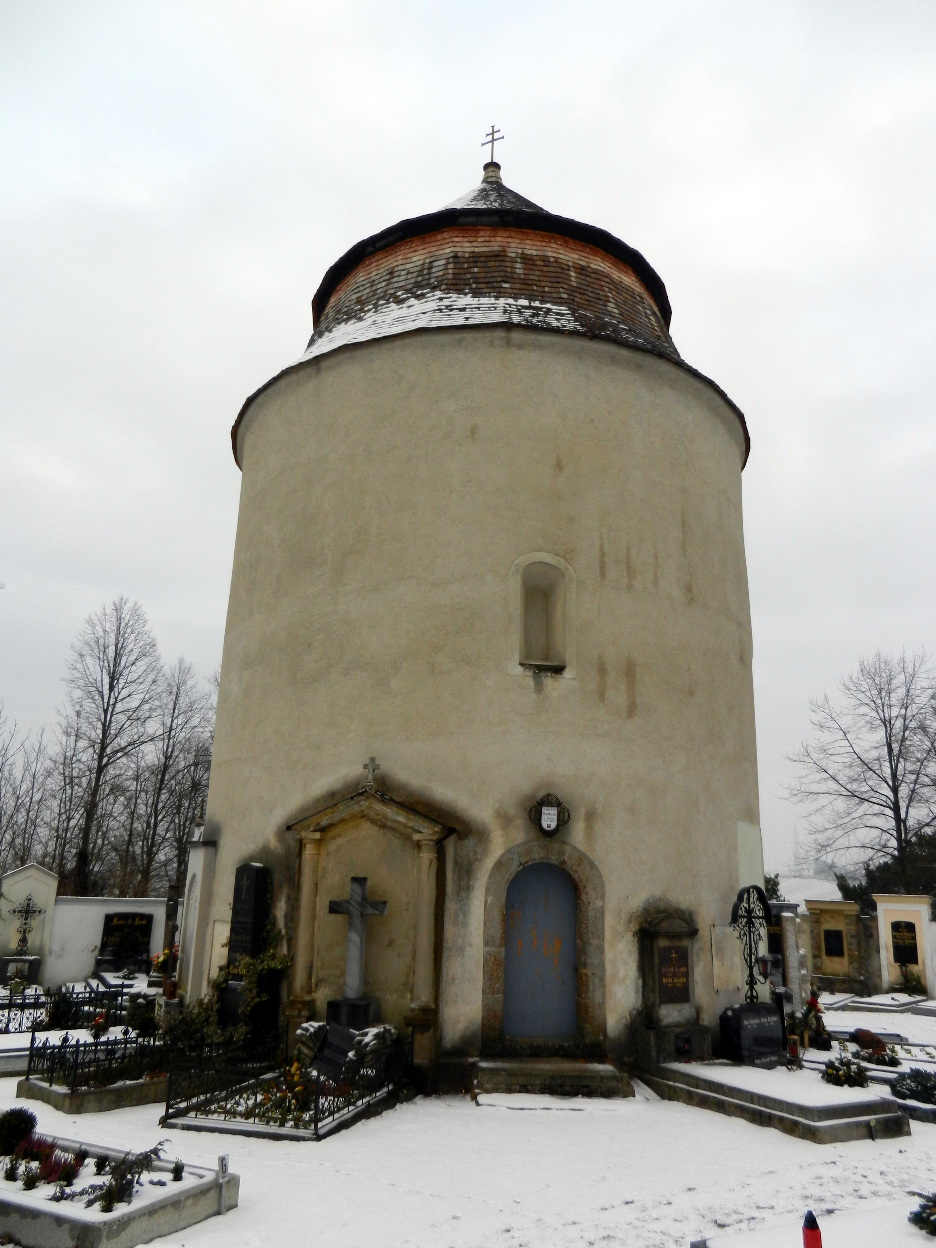 Karner Propstei Zwettl